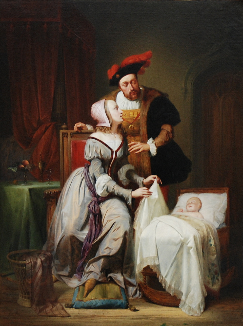 Museum van Schone Kunsten te Gent (België) - schilderij van Théodore-Joseph Canneel Keizer Karel met zijn minnares Johanna van der Gheynst bij de wieg van hun dochter Margaretha van Parma